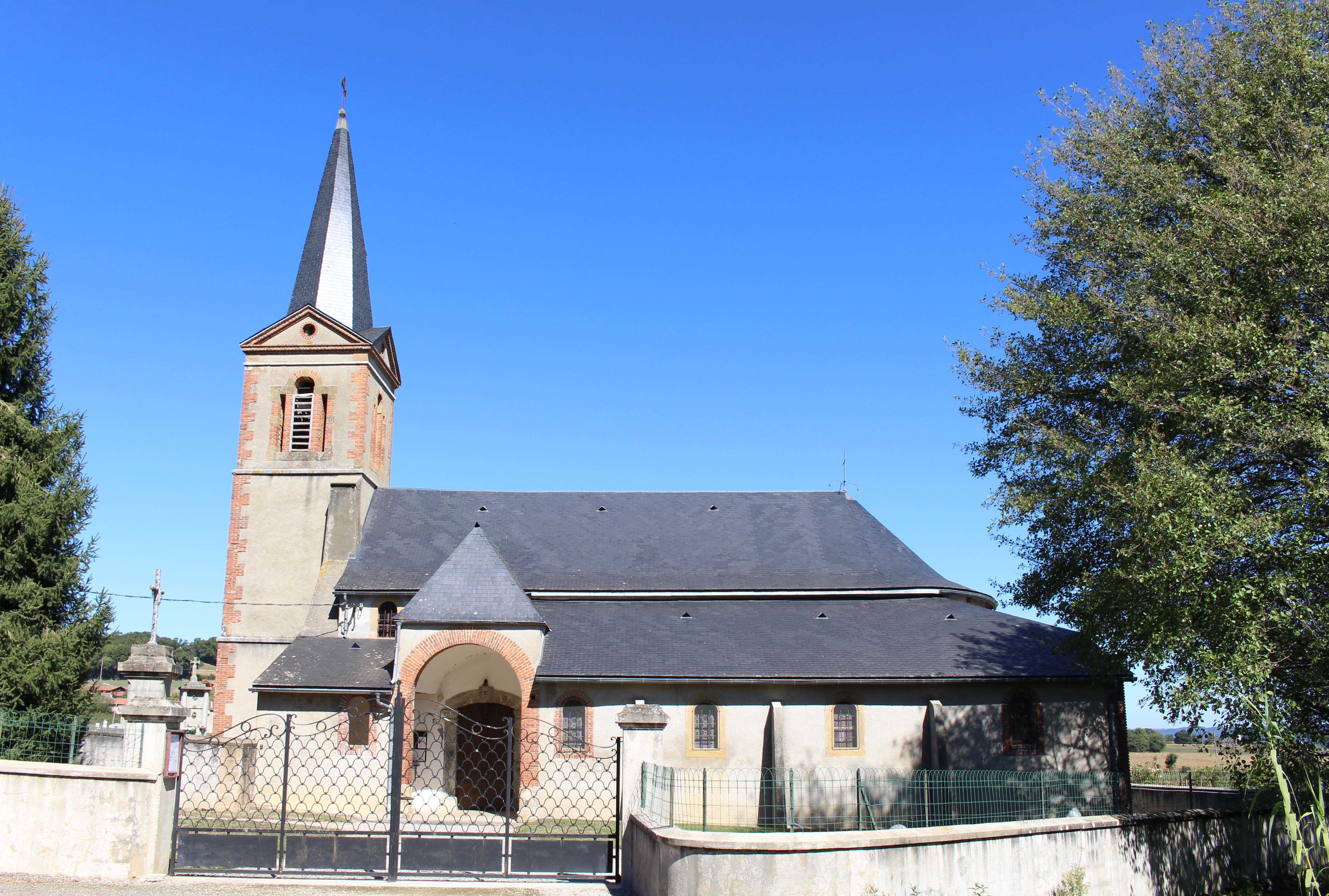 Église Saint-Laurent de Villembits (Hautes-Pyrénées)